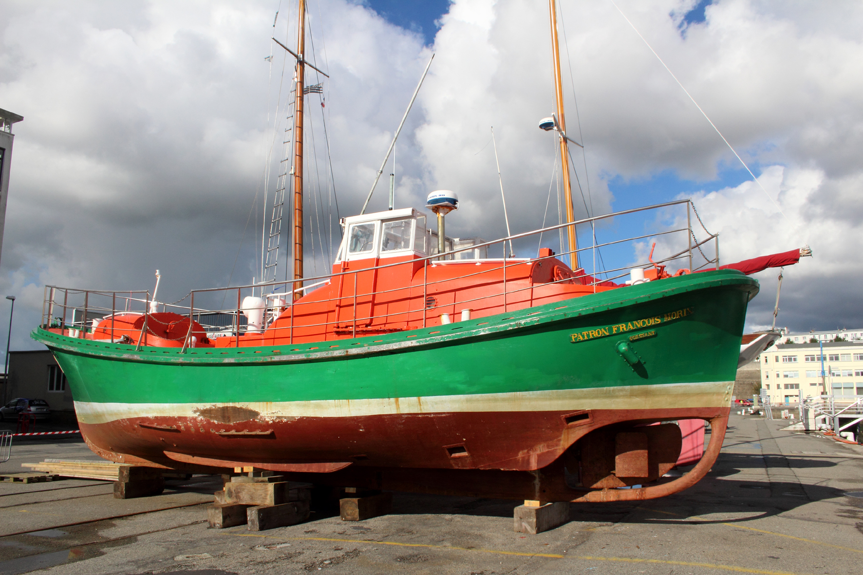 Le canot de sauvetage de la SNSM Patron François Morin de l'ïle d'Ouessant devant le chantier du Guip, quai Malbert à Brest